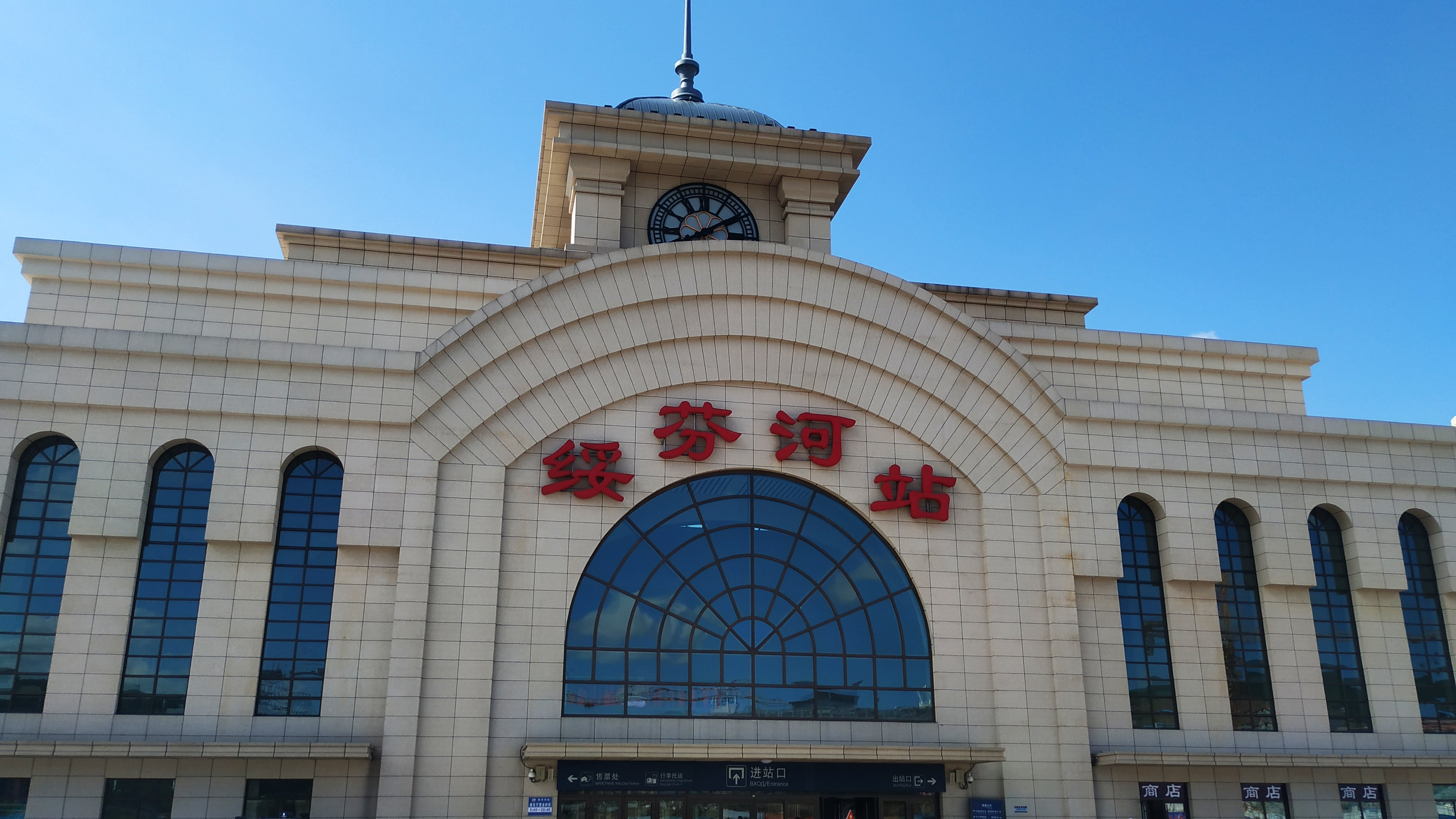 中文（中国大陆）: 绥芬河新站